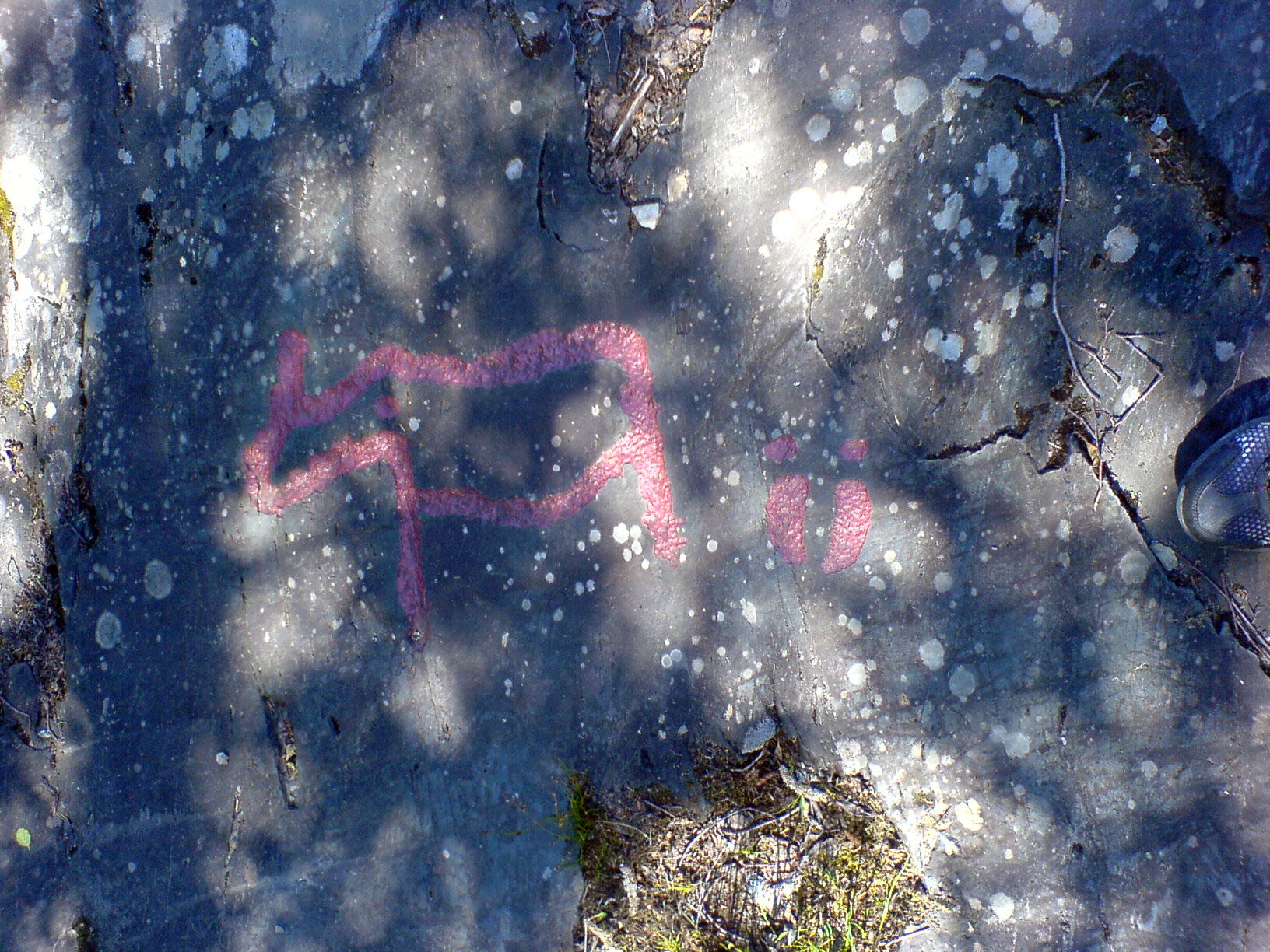 Hällristningar vid Gärde i Jämtlands län.